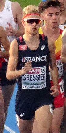 Młodzieżowe Mistrzostwa Europy w Lekkoatletyce U23 w Bydgoszczy 13-16 lipca 2017, bieg na 5000 m mężczyzn